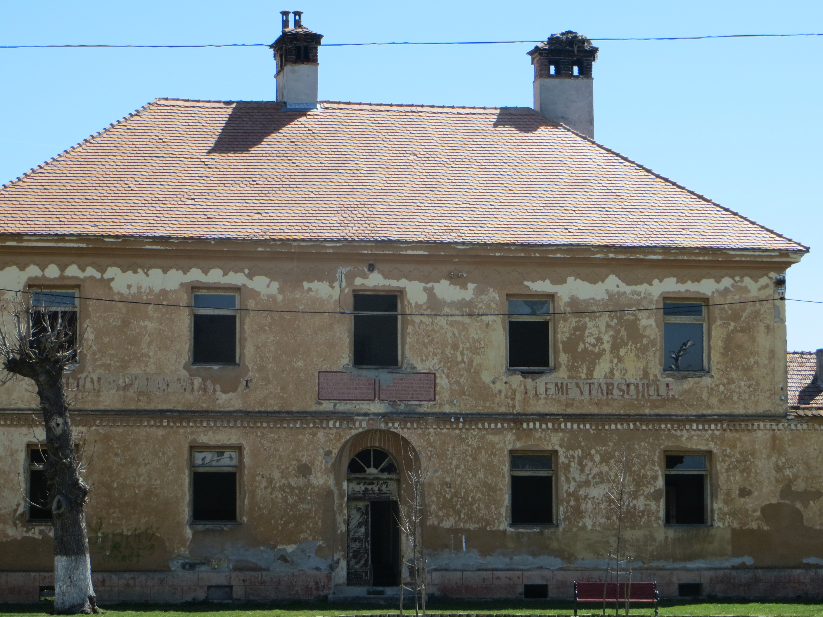 Școala confesională evanghelică (trei corpuri în incintă comună), azi școală generală